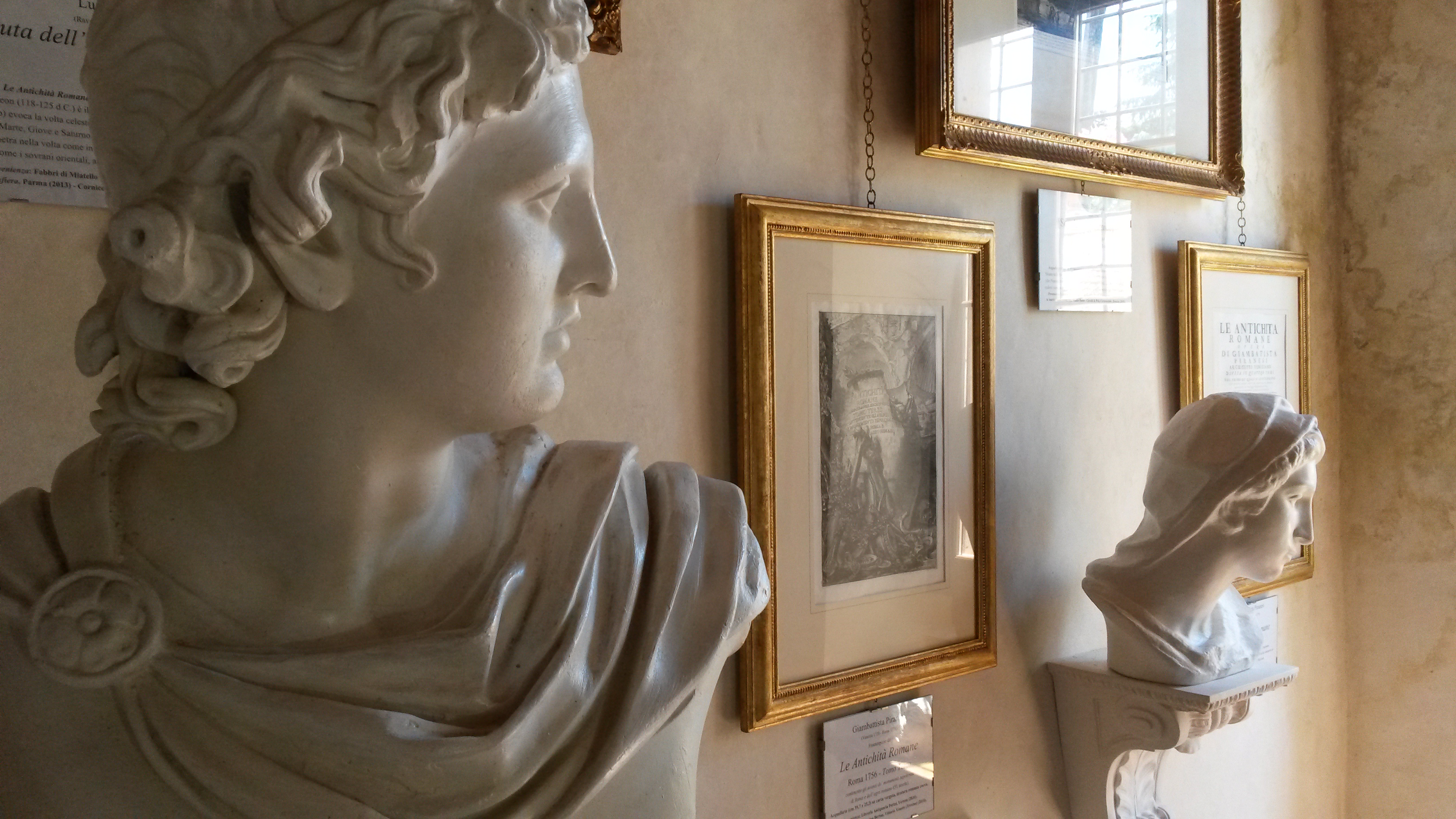 Busto dell' "Apollo del Belvedere" (calco in gesso) e Testa della "Madonna allattante" (da Michelangelo, calco in gesso).